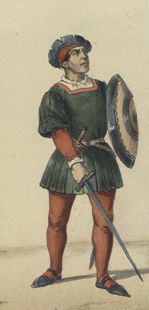 Испанский щитоносец, 1493 г.